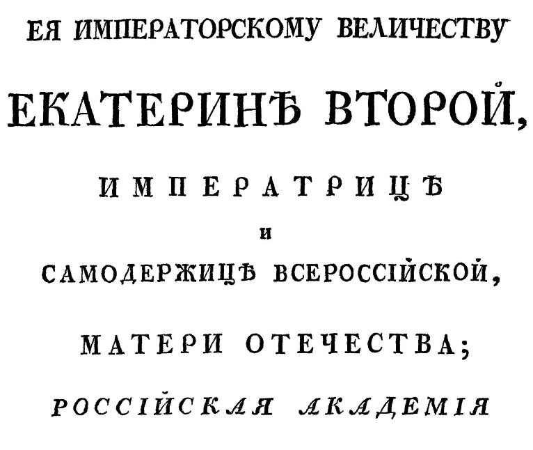 Академия Российская (1783-1847)